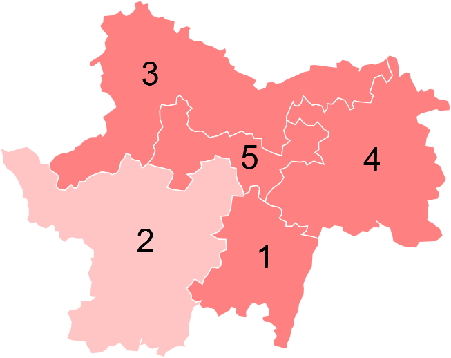 Résultats des élections législatives de la Saône-et-Loire en 2012